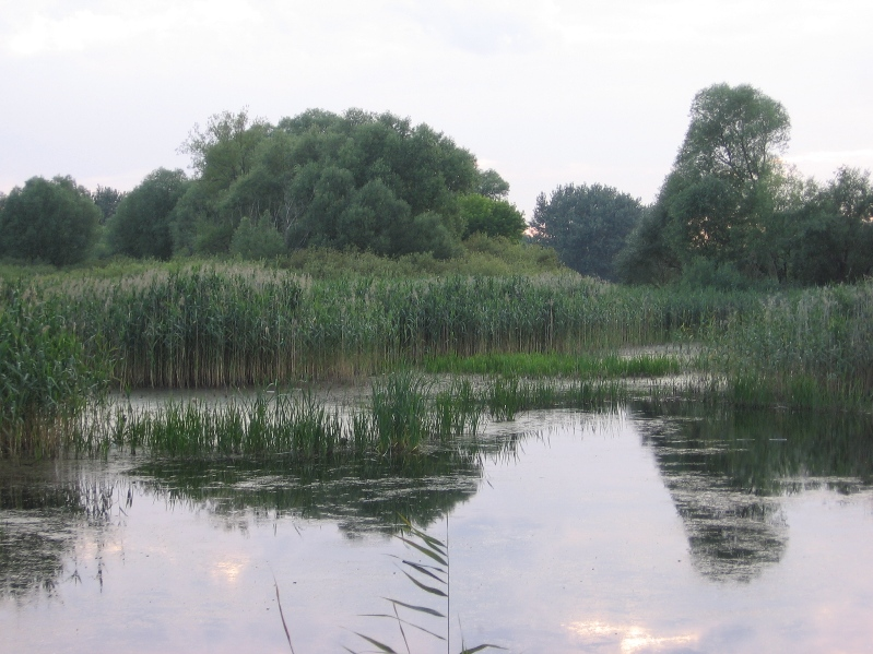 «Альта»